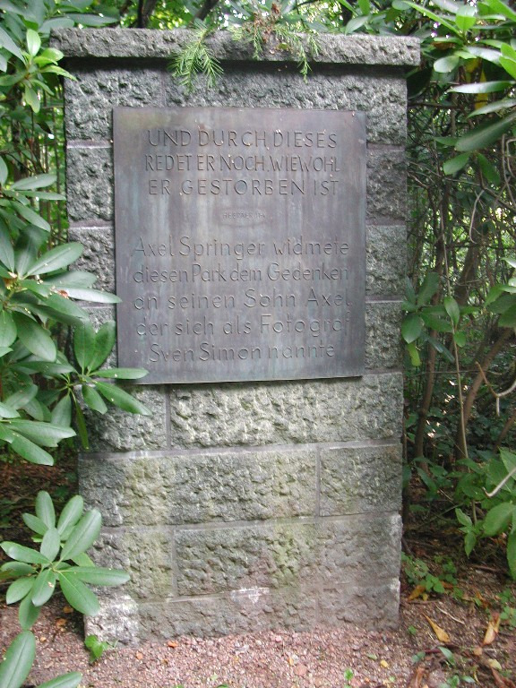 "UND DURCH DIESES REDET ER NOCH, WIEWOHL ER GESTORBEN IST Axel Springer widmete diesen Park dem Gedenken an seinen Sohn Axel, der sich als Fotograf Sven Simon nannte." Sven-Simon-Park am Falkenstein, Hamburg.Im Park